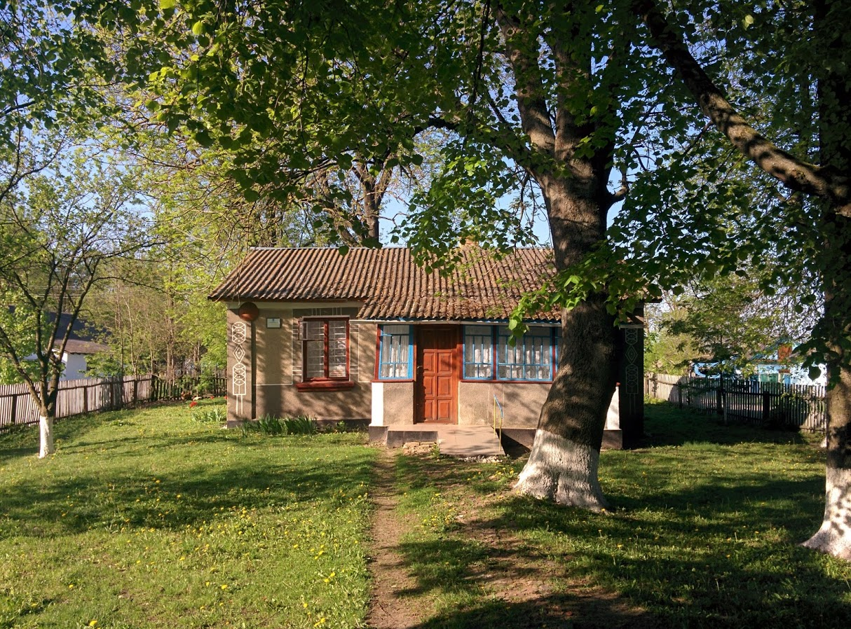 Будинок сільської бібліотеки